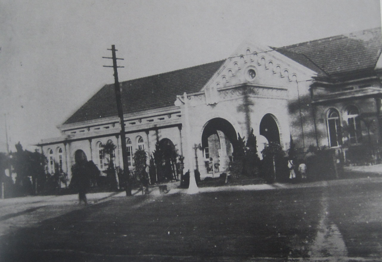 麻豆公會堂